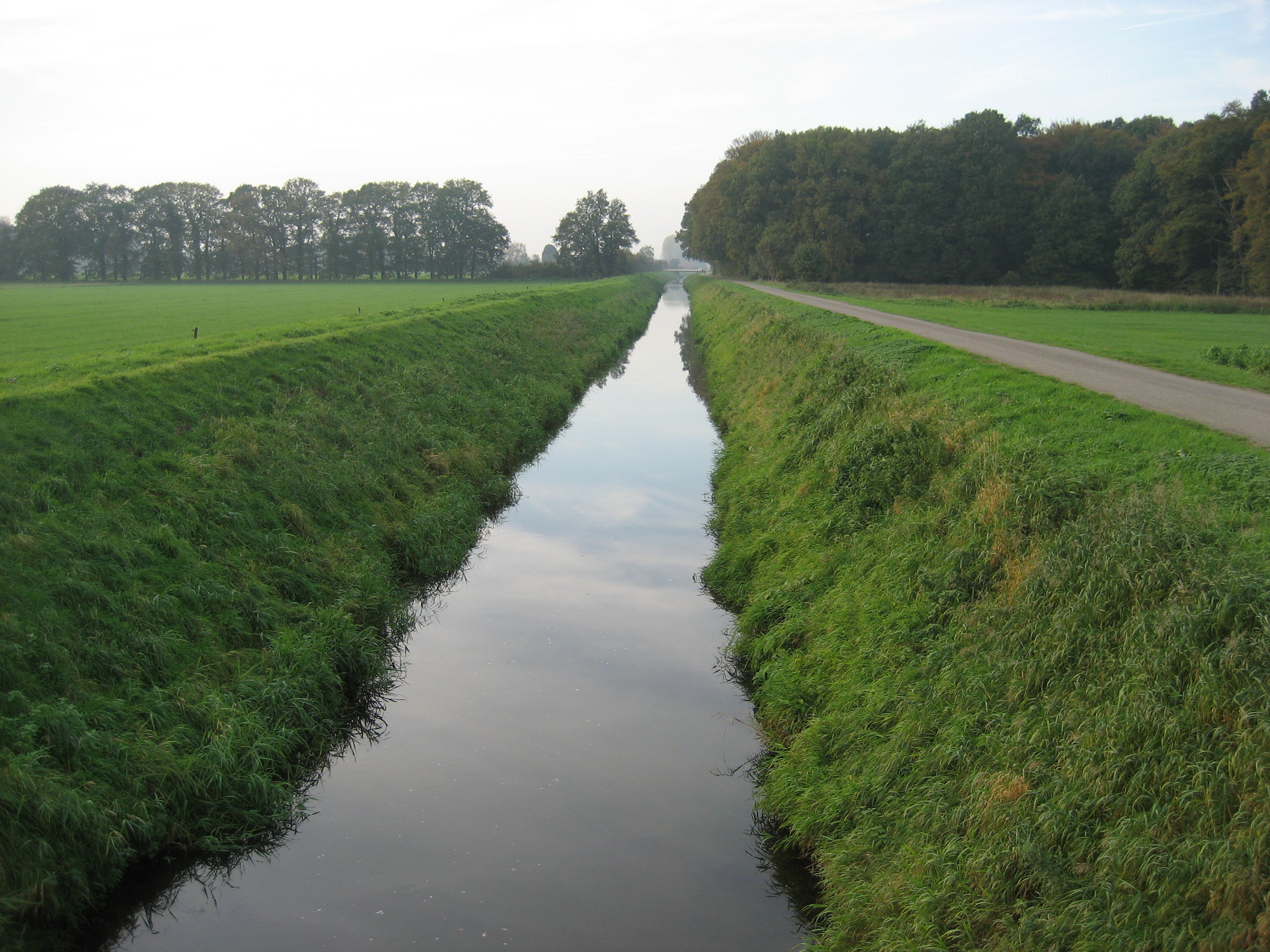 Klever Landwehr, bei Obrighoven, Issel hinter der Bärenschleuse